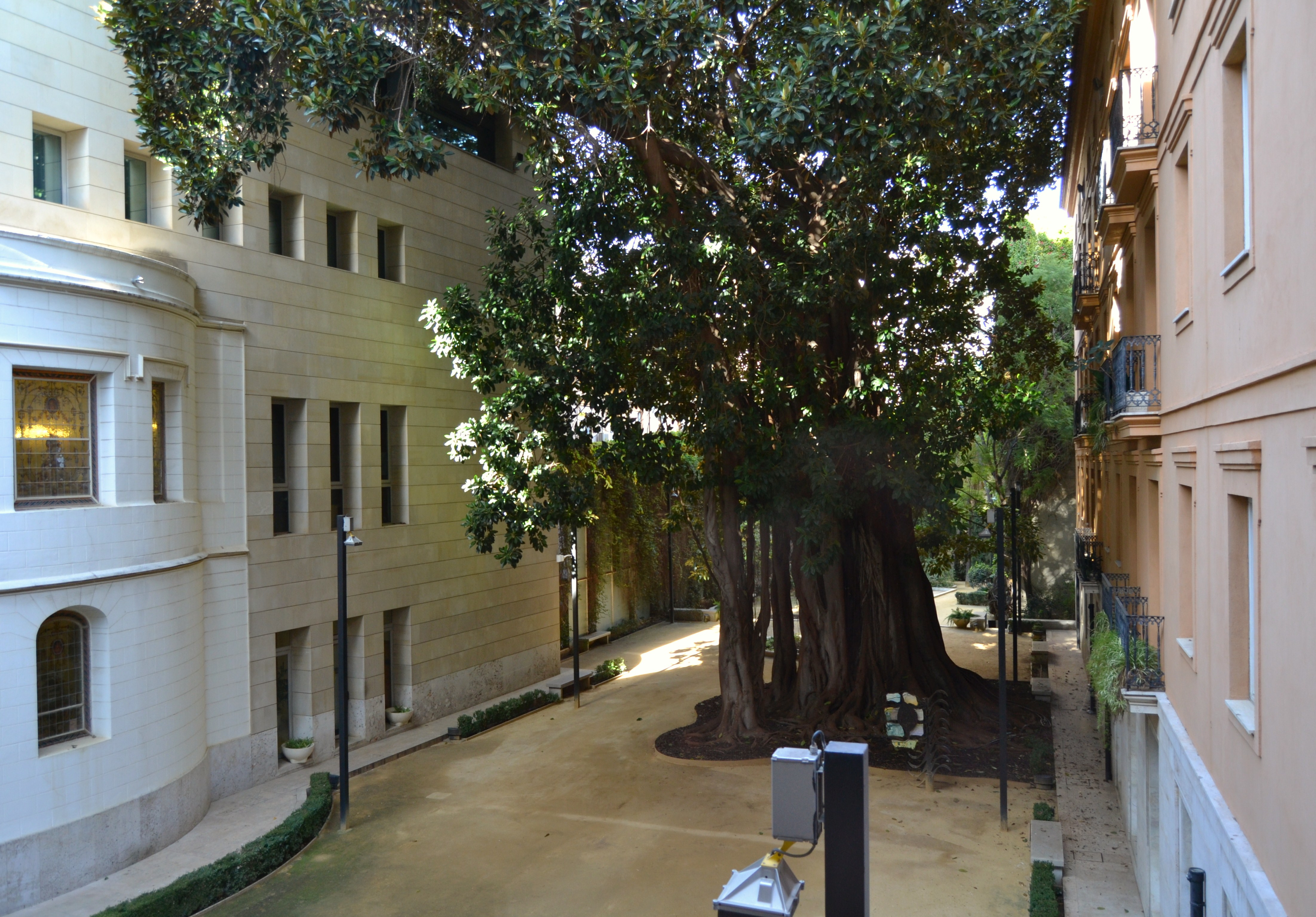 Jardí del palau de Benicarló.